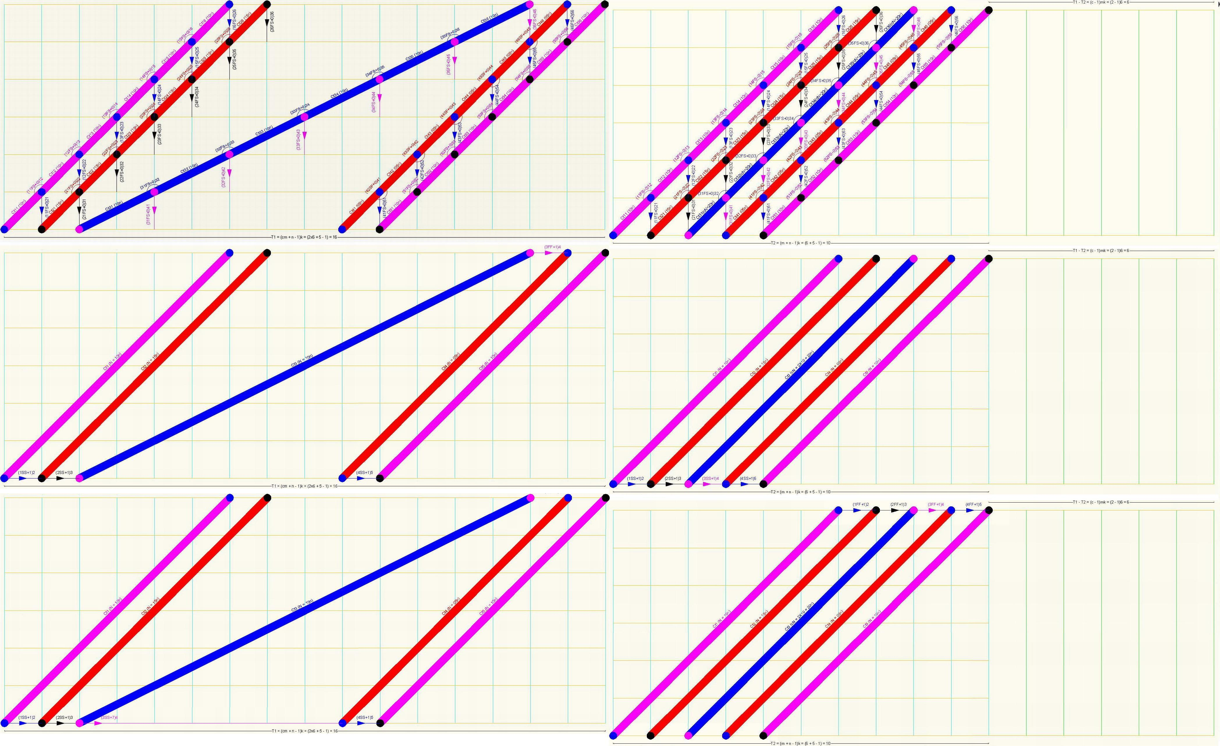 Biến đổi một dây chuyền chuyên môn hóa nhịp nhàng về một gói công việc. Hình do tôi vẽ bằng phần mềm Auto CAD 2010.